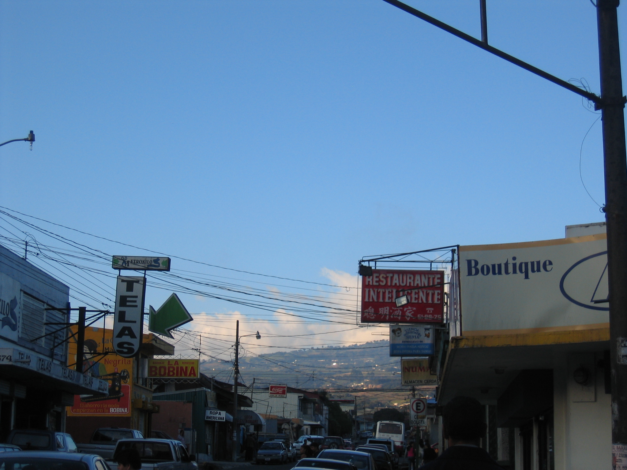 Cartago in Costa Rica.